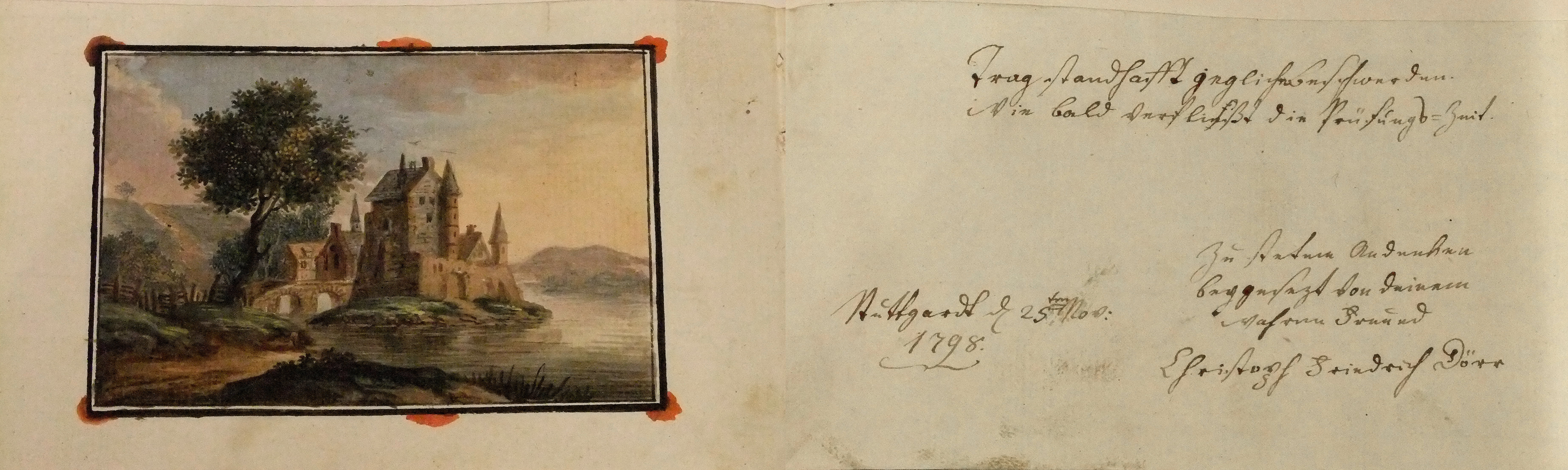 Freundschaftsblaetter aus Tübingen und Stuttgart - Einzelblatt mit Eintrag von Christoph Friedrich Dörr in Stuttgart